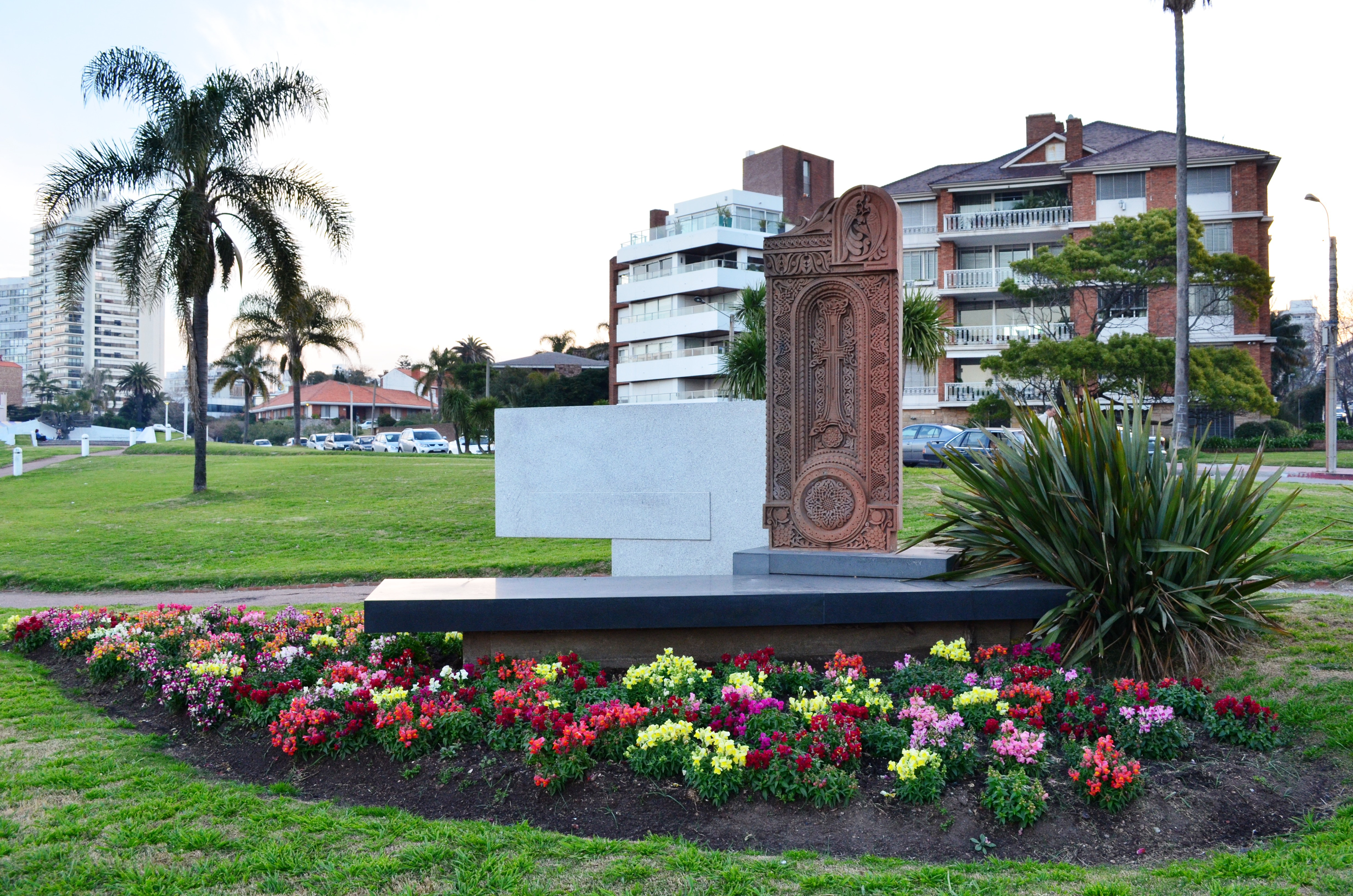 Homenaje de la Colectividad Armenia al Uruguay. Ubicada en el departamento de Montevideo